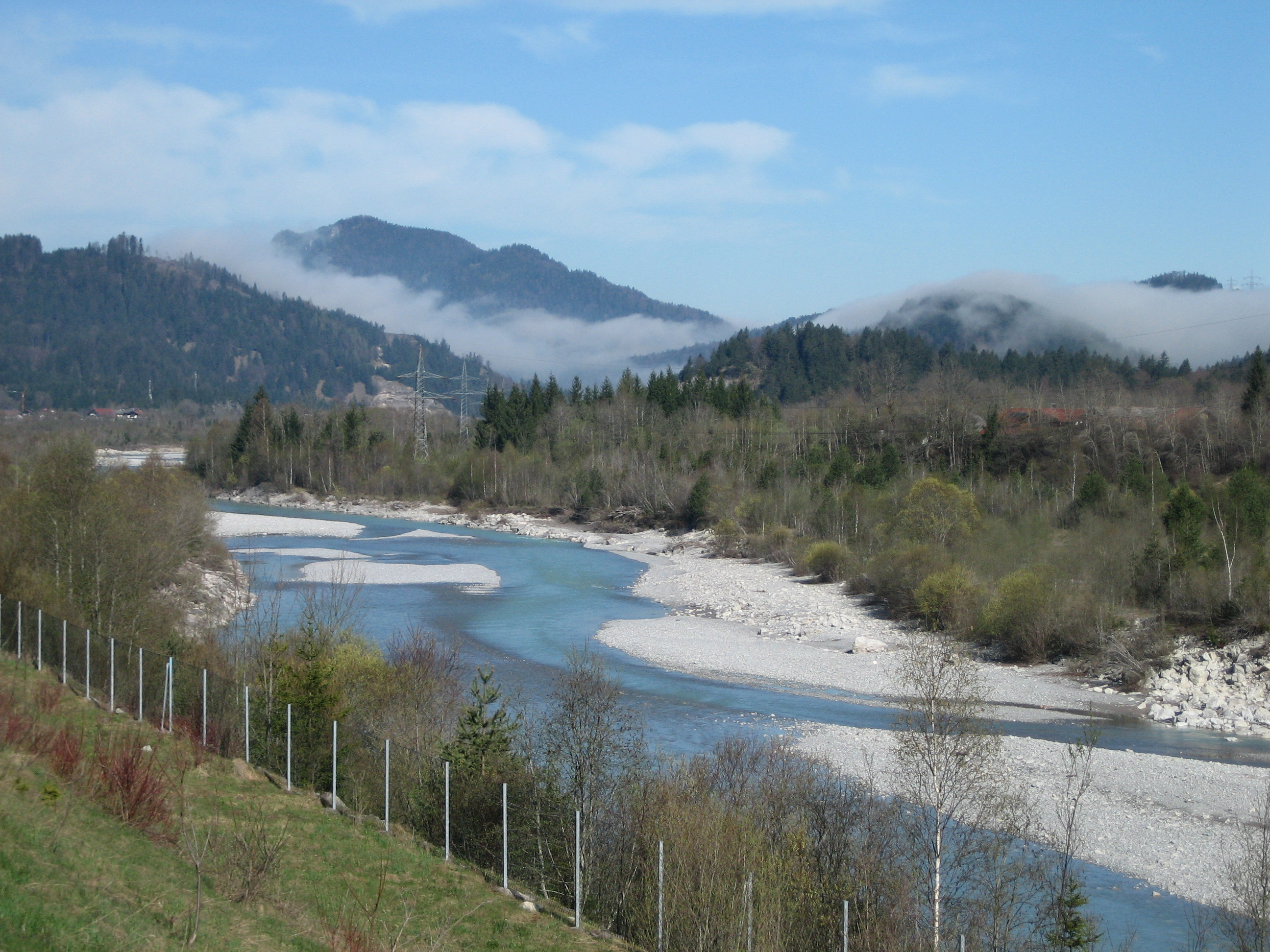 Lechb bei Reutte